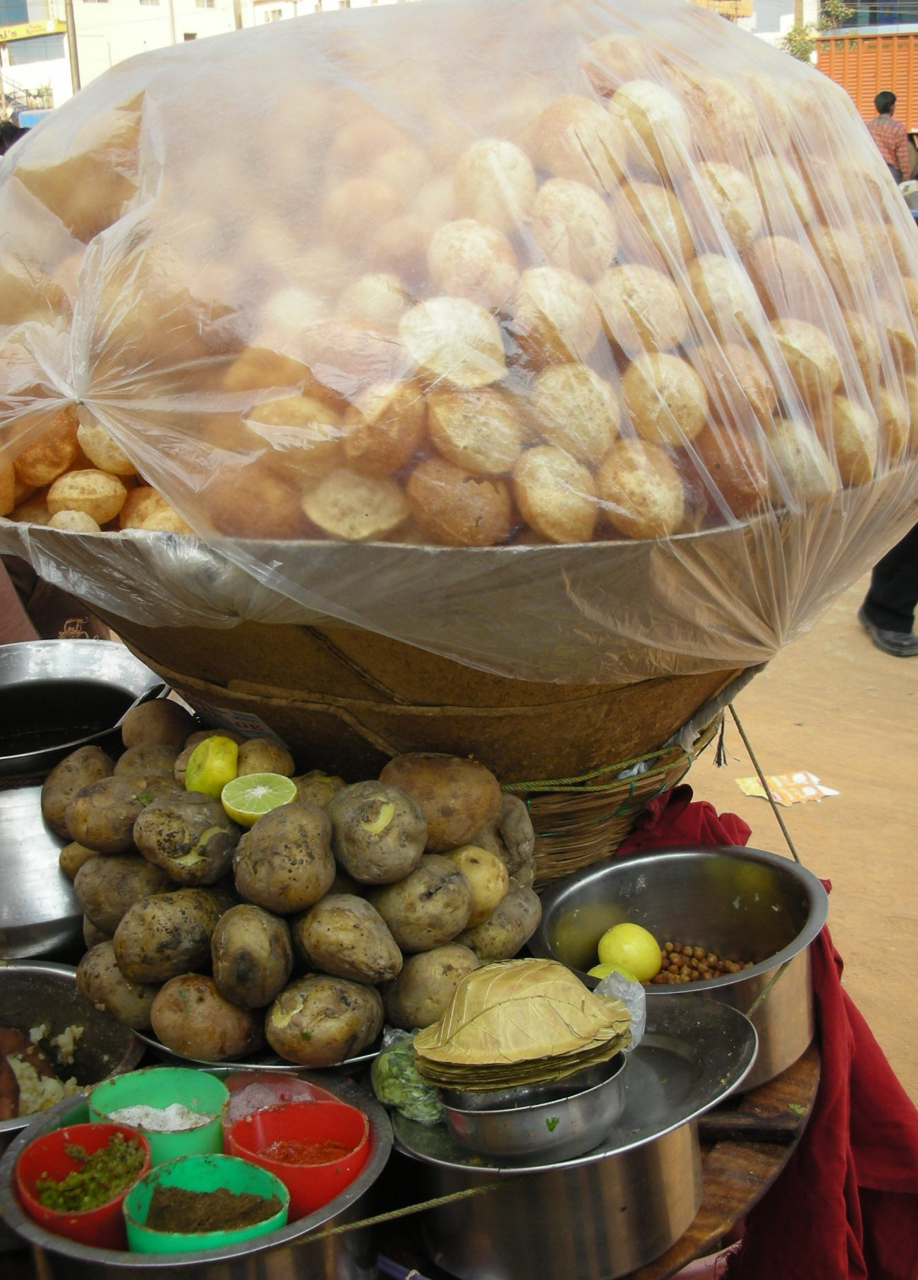 Calcutta style pani puri